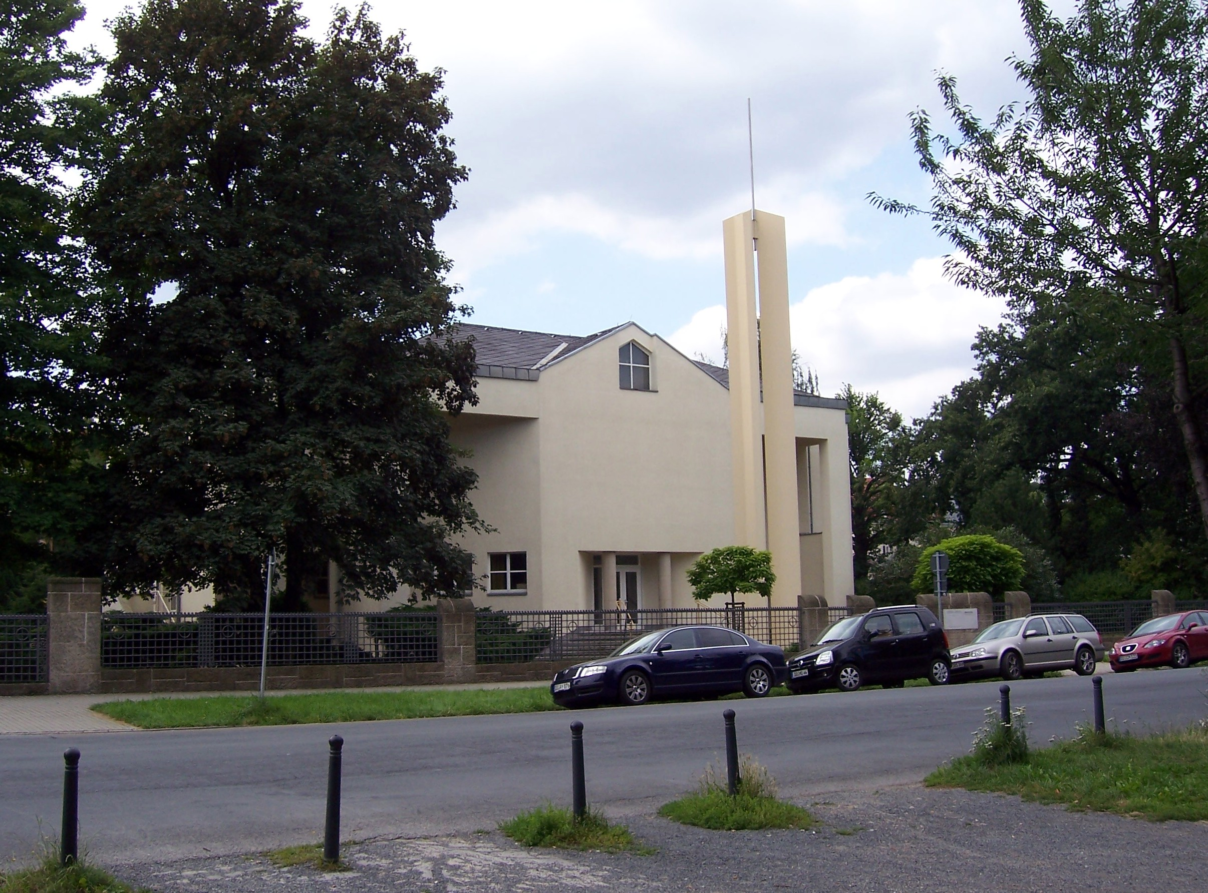 Gemeindehaus der Kirche Jesu Christi der Heiligen der Letzten Tage (Mormonen) in Dresden.